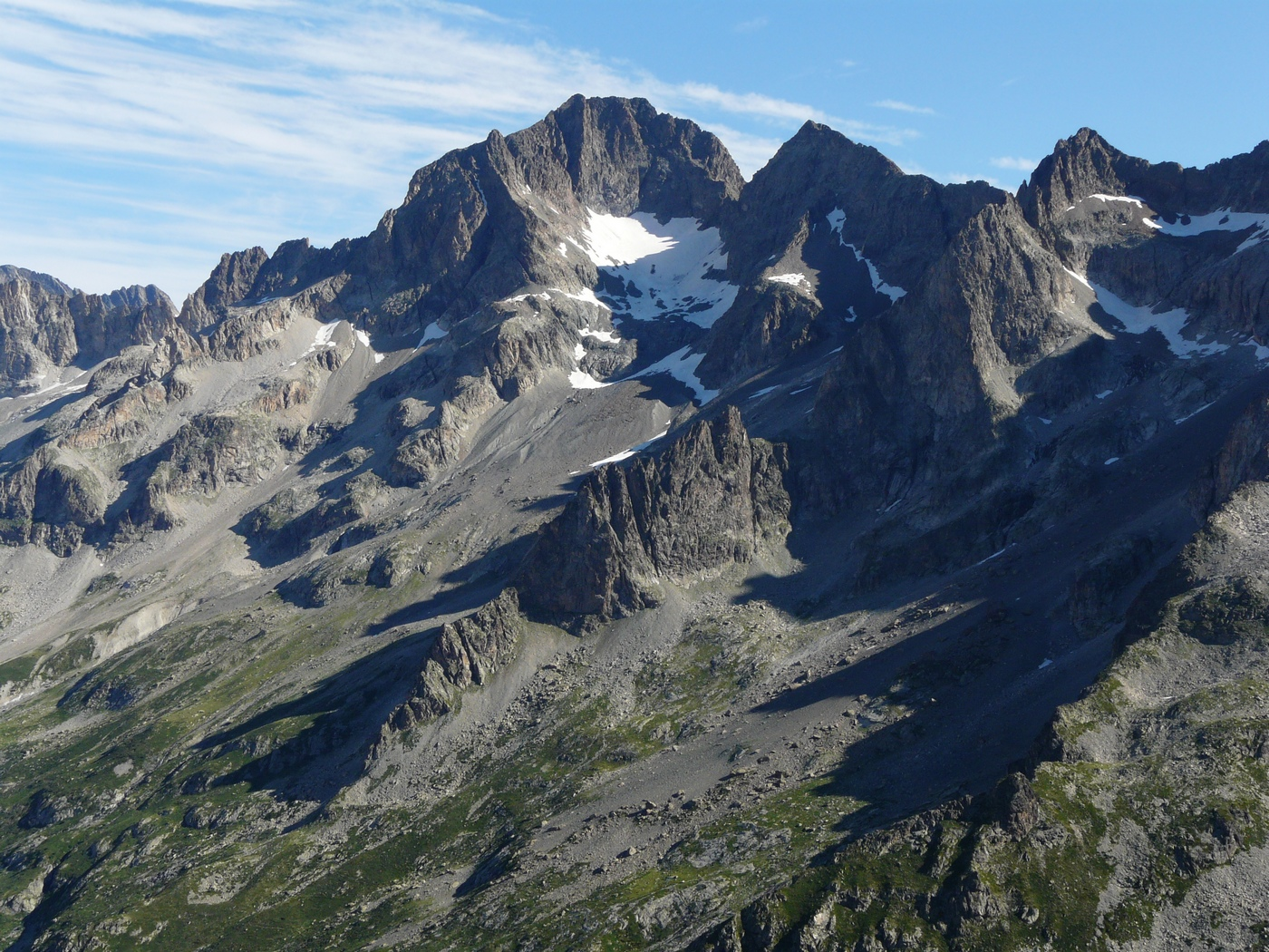 L'Aiguille des Arias - Massiccio des Écrins